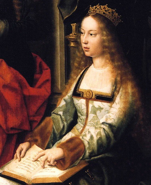 Possible imagen de Isabel la Católica, reina de Castilla (о Santa Catalina de Alejandría), en el retablo «La Virgen de la Mosca» («Sagrada Familia con Santa Magdalena y Santa Catalina»).